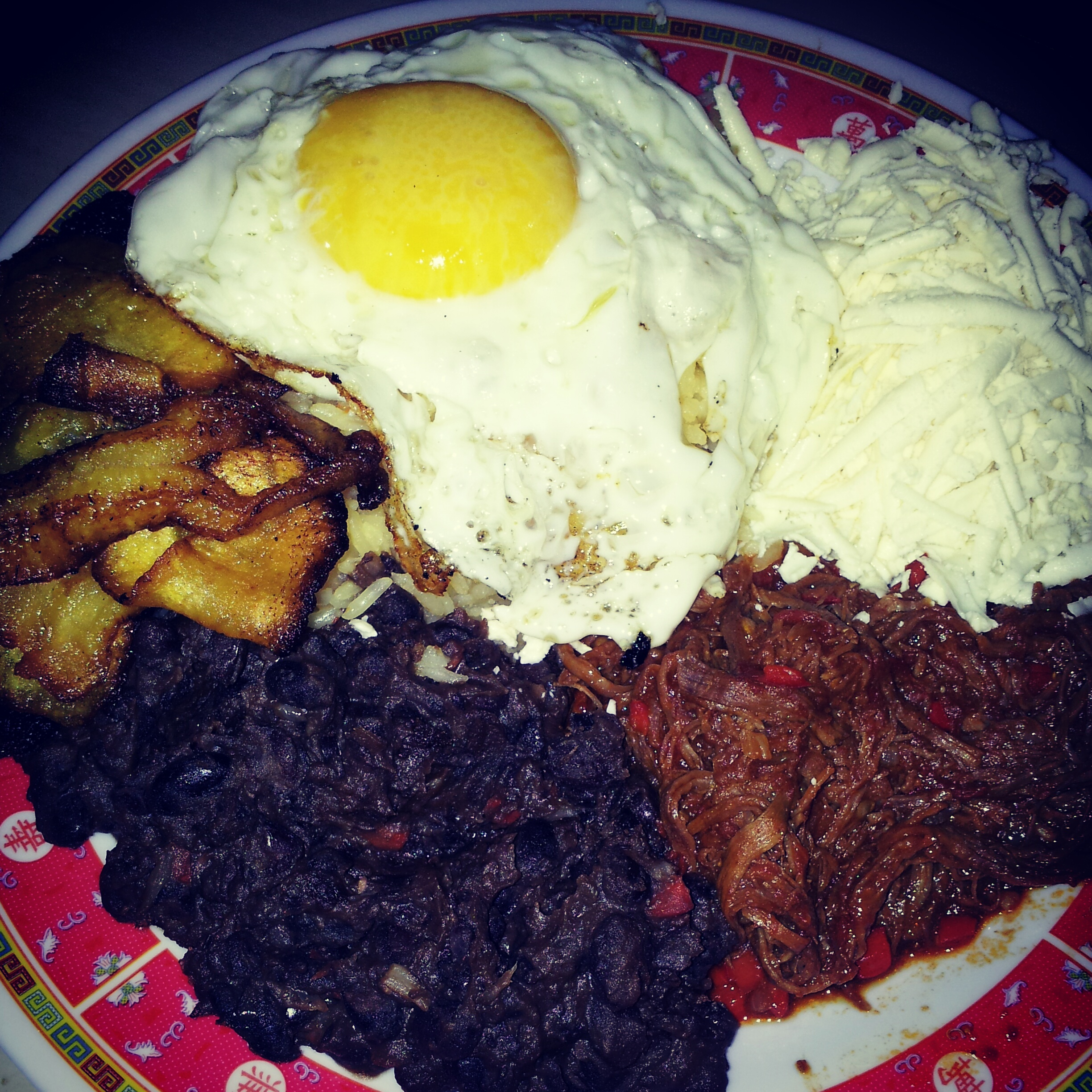 Un platillo tipico de venezuela. Caraotas fritas, tajadas, queso y arroz con un huevo frito encima